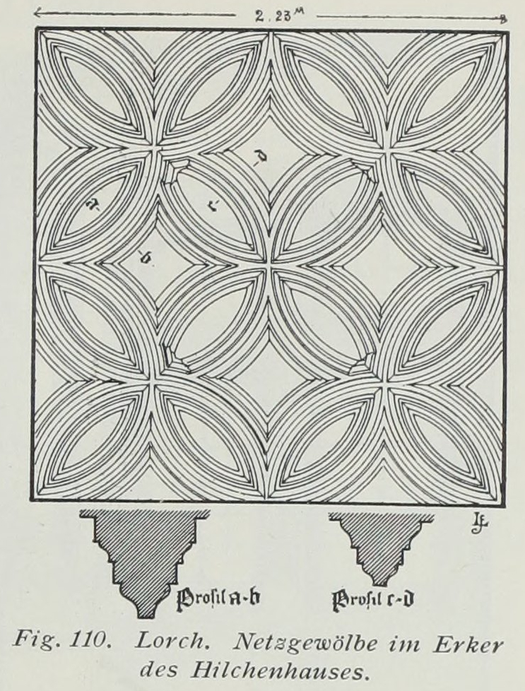 Lorch Netzgewölbe im Erker des Hilchenhaus